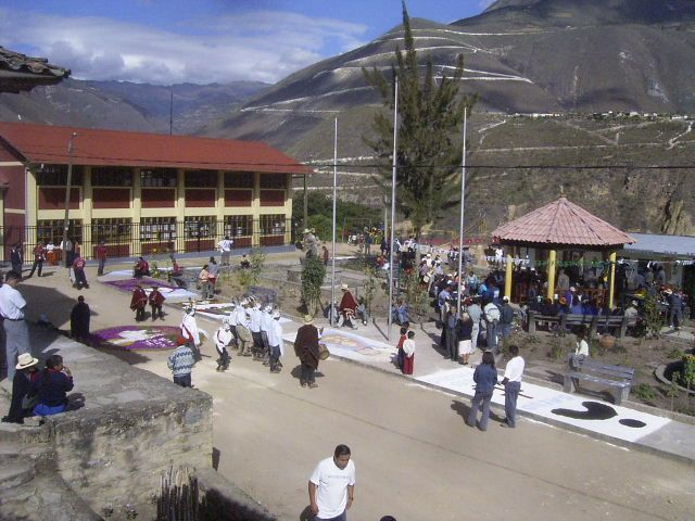 Fiestas patronales en Magdalena, Chachapoyas, Amazonas, Peru.